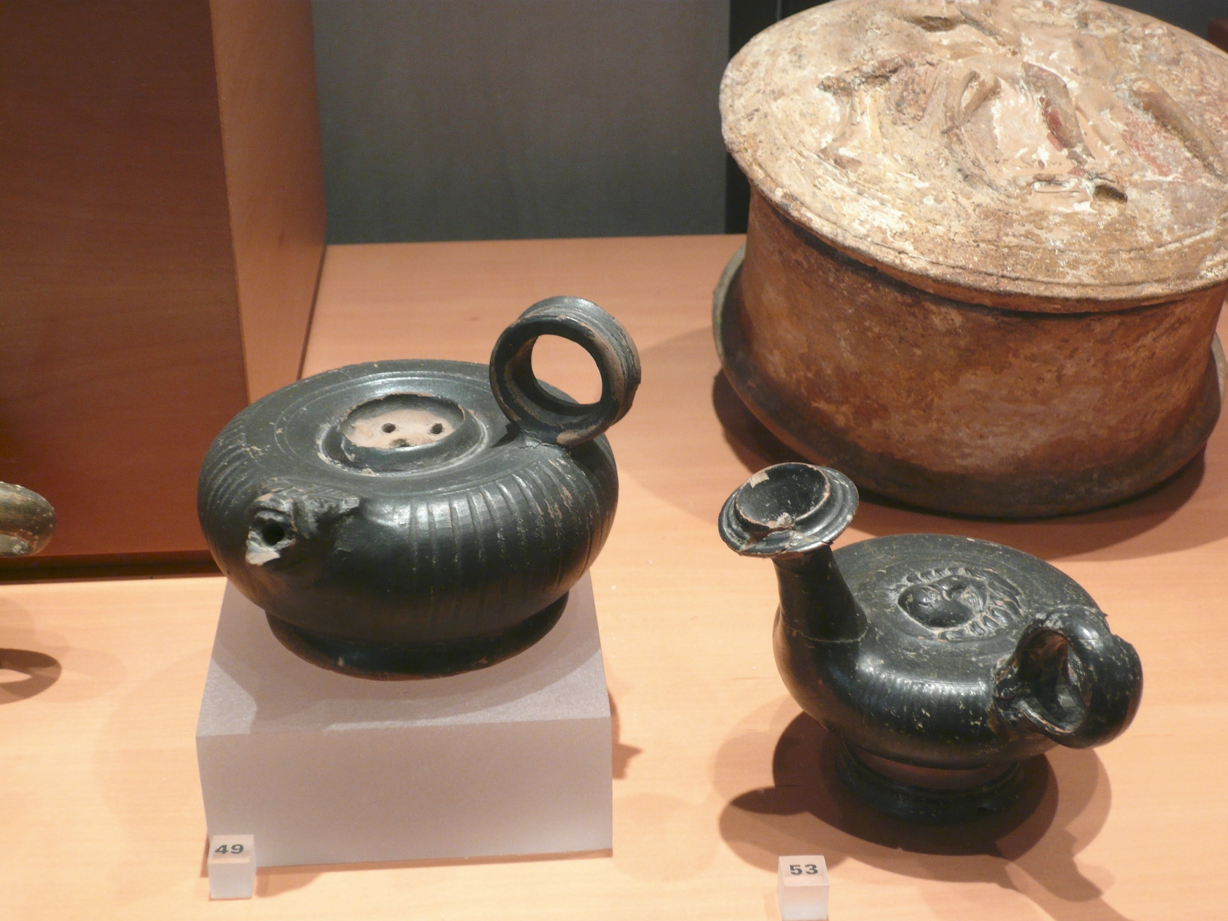 Vase passoir (350-300 av J.C.) et guttus (400-350 av J.C.), antiquité classique musée d’archéologie méditerranéenne de la vieille charité à Marseille.